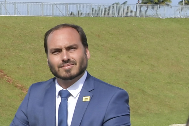 Solenidade - Após tomar posse, jurar cumprir a Constituição e discursar aos parlamentares, o presidente, Jair Bolsonaro sai do Congresso e segue cortejo até o Palácio do Planalto. Participam: Carlos Bolsonaro; primeira-dama, Michelle Bolsonaro. Foto: Marcos Brandão/Agência Senado